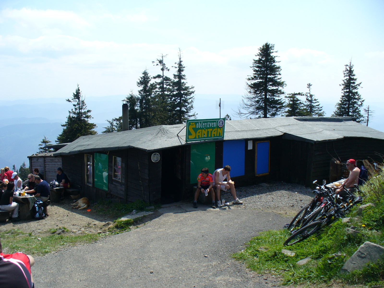 Bufet w miejscu dawnej "Bezručovej chaty" - Lysa Hora